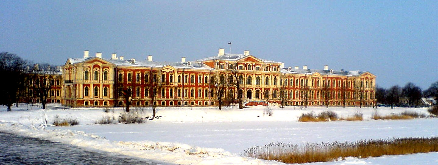 Schloss Jelgava, Lettland